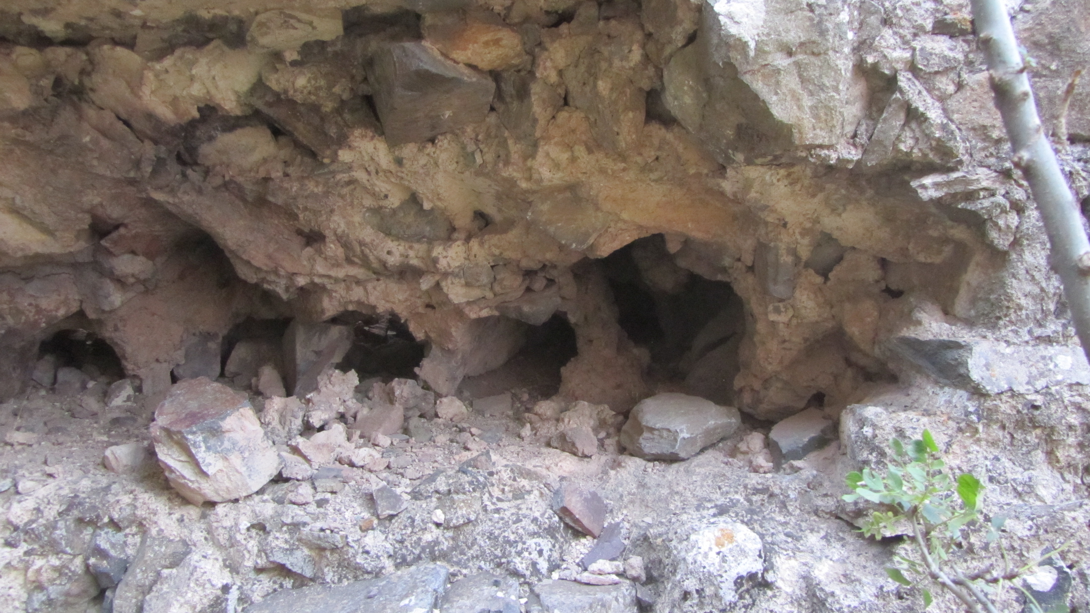 Ամրոց Բաղաբերդ (Դավիթ Բեկի բերդ) - Անդոկավան - քաղաքից ամ, Քաջա­րան տանող մայրուղուց ձախ, Ողջի գետի և նրա ձախ վտակ Գիրաթաղ գետակի միջև, բար­ձունքի վրա - Սյունիքի նշանավոր ամրոցներից էր, կիսավեր 13.1/1